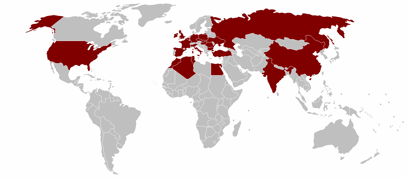 Monte dei Paschi di Siena global locations